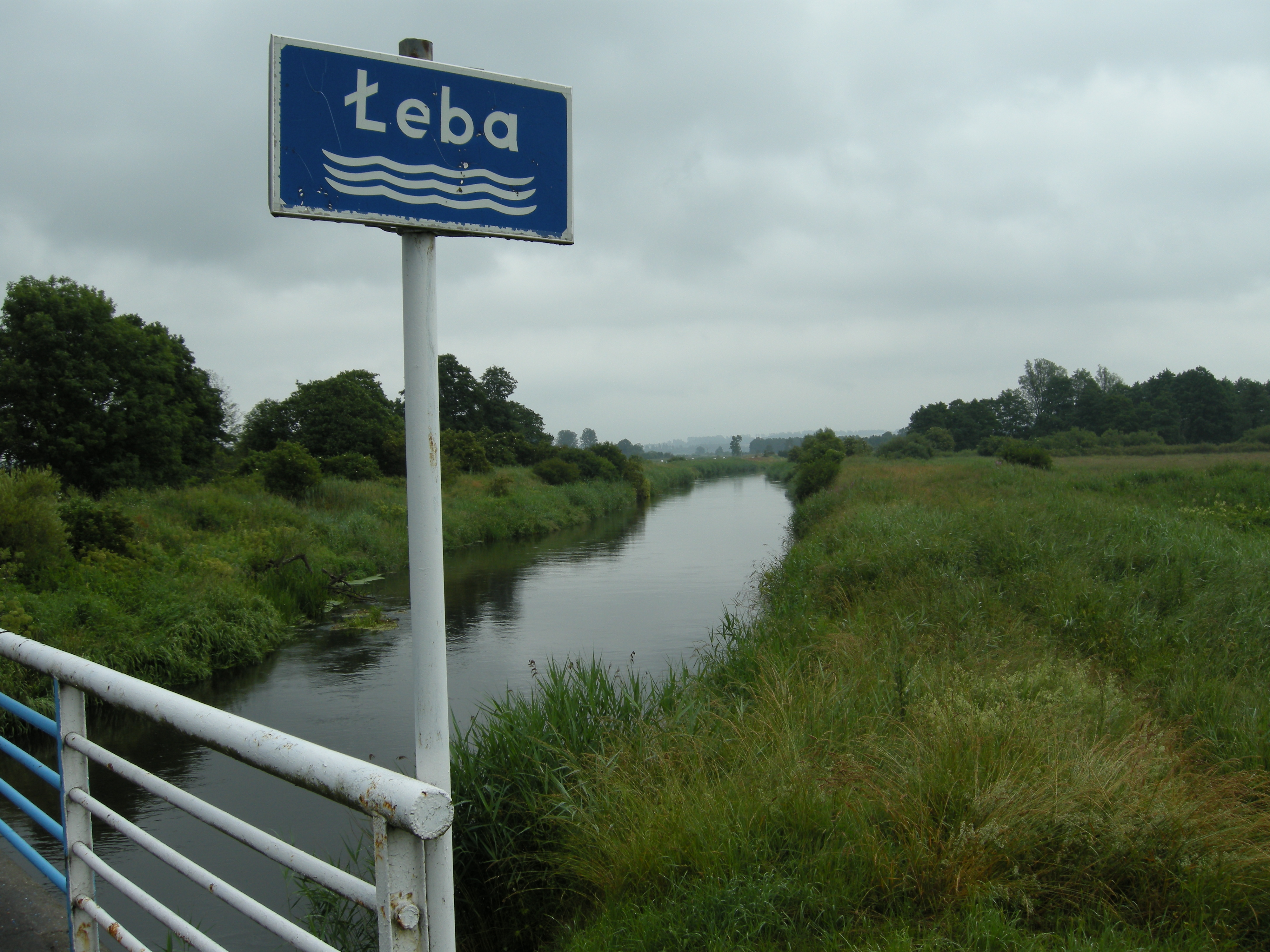 Rzeka Łeba w Polsce. Widok z mostu.